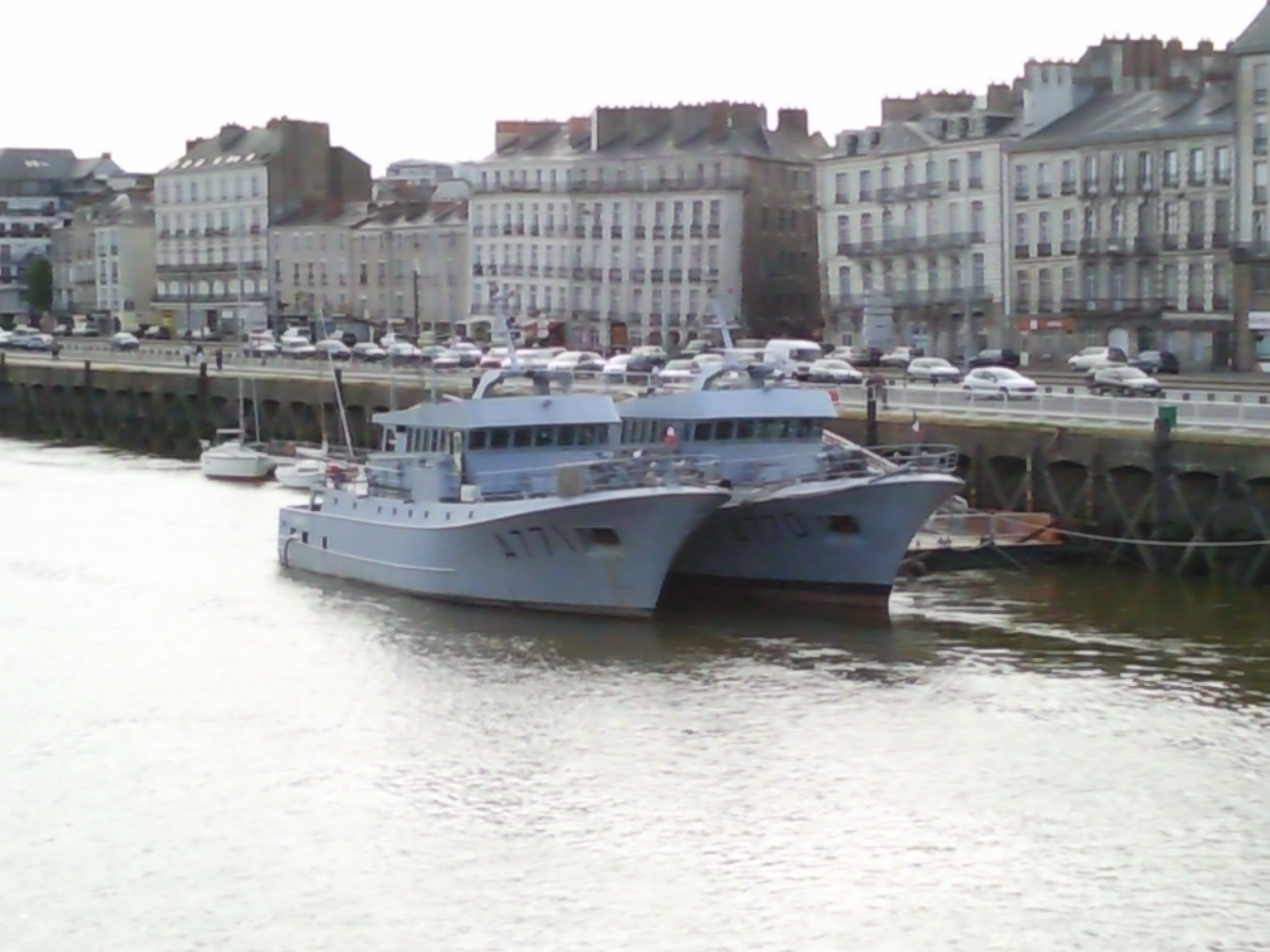 Bâtiments d'Instruction à la Navigation (BIN) Glycine (A770) et Églantine (A771) à Nantes